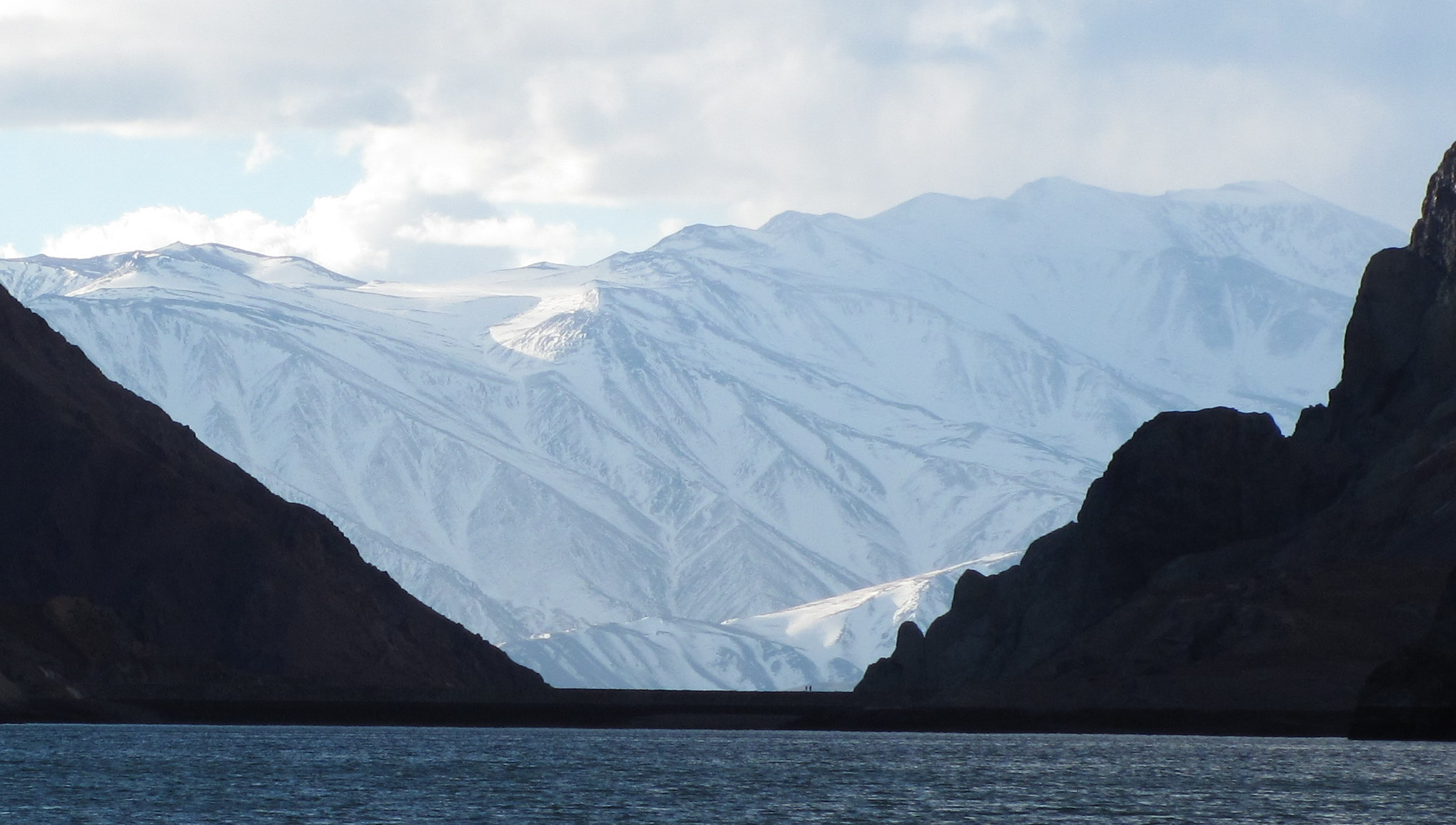 Glaciar La Laguna, en la Cordillera de los Andes, cerca de la frontera chileno-argentina.